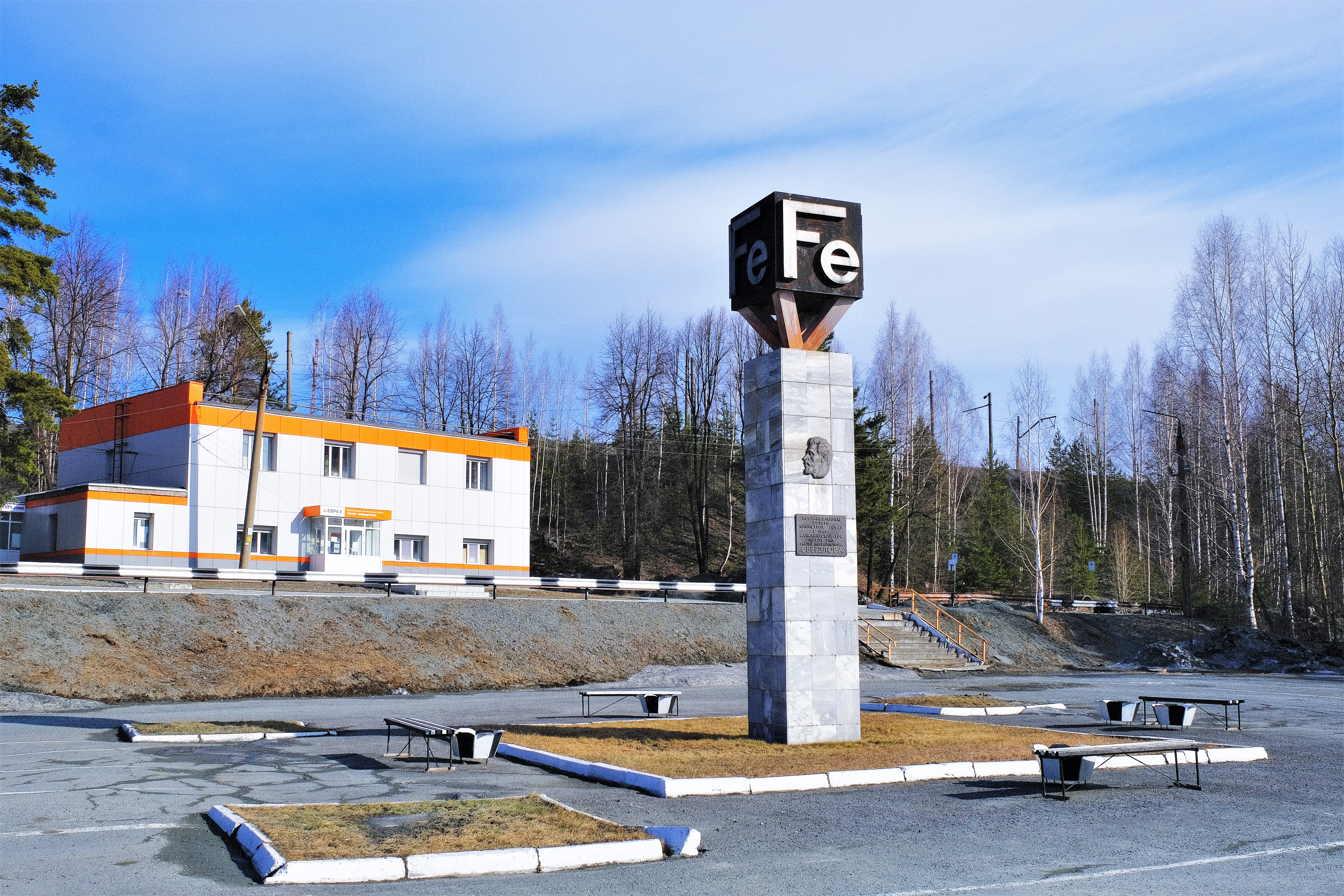 Стела в честь присвоения Качканарскому ГОКу имени Я. М. Свердлова (сквер около здания управления)